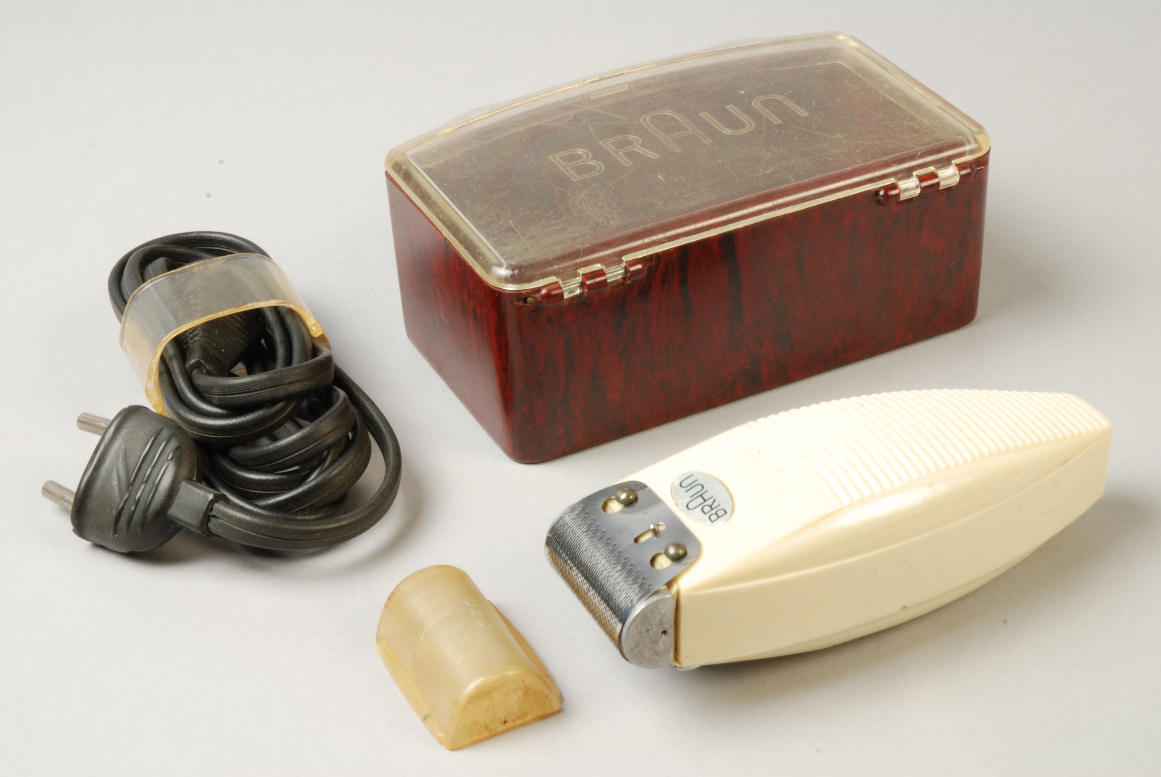 Objectgegevens Titel: Wit ellipsvormig scheerapparaat Braun S50 Standard met los zwart snoer, in donkerrood kunststof doosje met transparant klepdeksel Beschrijving: De "S50 Standard" was het eerste apparaat van Braun. Dit elektrische scheerapparaat (A) was al in 1938 ontwikkeld en de staafvorm was op het moment van verschijnen eigenlijk al gedateerd. Deze witte uitvoering van typenummer L72 oogde echter moderner dan het oorspronkelijk donkerbruin bakelieten ontwerp. Voorzien van beschermkapje in transparant kunststof. Aan de achterzijde een schakelaar voor 110 of 220V. Zwart snoer (C) opgerold in een houder. Alles samen in een bruinrood bakelieten doosje (B) met transparant deksel. Herkomst: St. Historisch Kostuummuseum. Trefwoorden: scheerapparaat, uitrusting Opschrift / merk: Voorzijde scheerapparaat: "Braun S50 STANDARD". Achterzijde: "110/220V 50 ~ L.72". Deksel en beschermkapje: "Braun". Vervaardiger: Braun ontwerp: Max en Arthur Braun Plaats vervaardiging: Duitsland Datering: 1951 - 1953 Materiaal: kunststof, metaal, rubber Afmetingen: (cm) doos: hg 4,8 / br 12,2 / dp 8,0 / apparaat: hg 11,5 / br 4,0 / dp 3,5 / snoer opgerold: hg 11,5 / br 4,0 / dp 3,0 Associatie: scheren, persoonlijke verzorging, man, elektriciteit Vorm & decoratie: toiletartikel Inventarisnr: Museum Rotterdam 79760-A-D